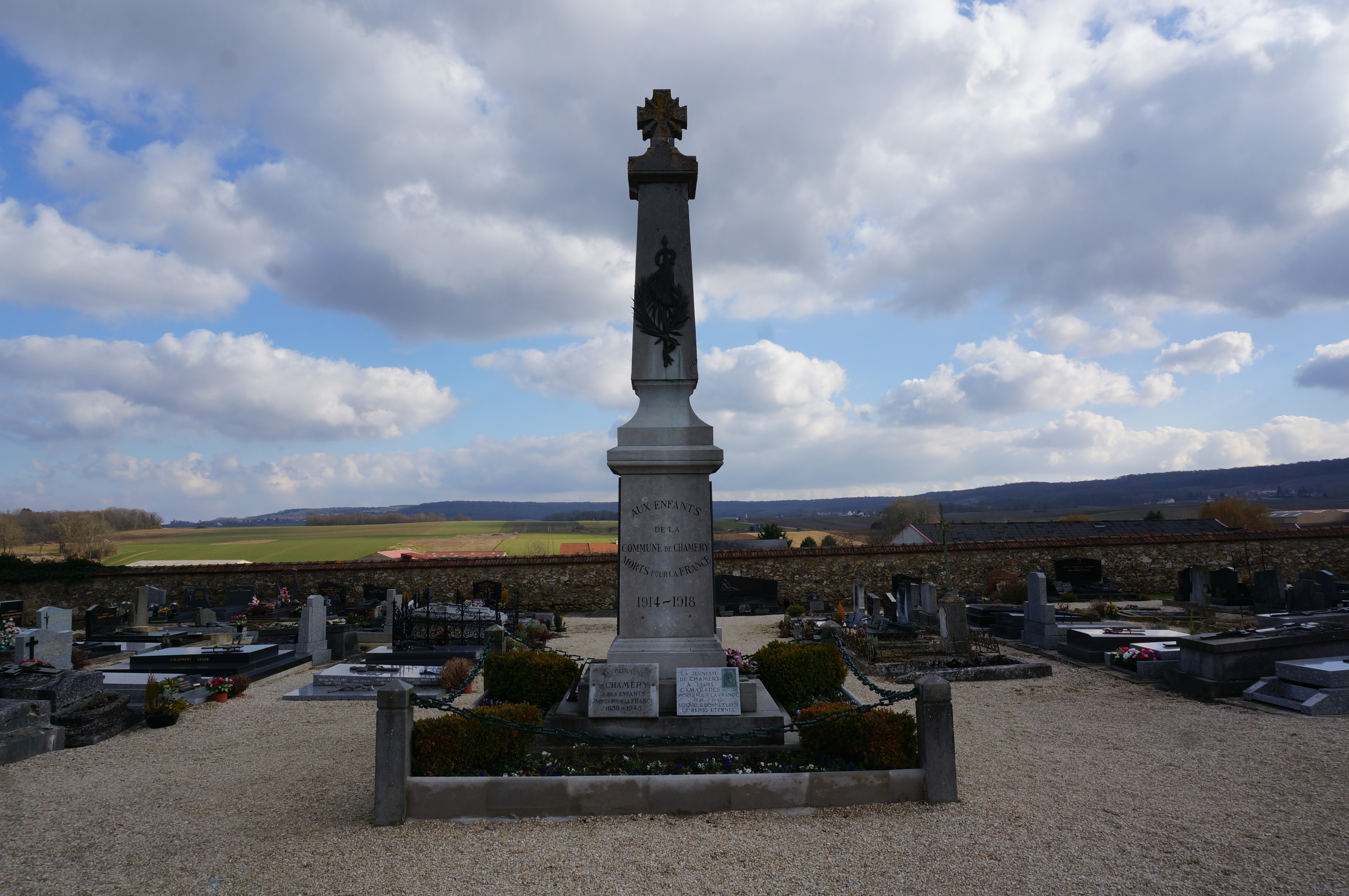 à Chamery.